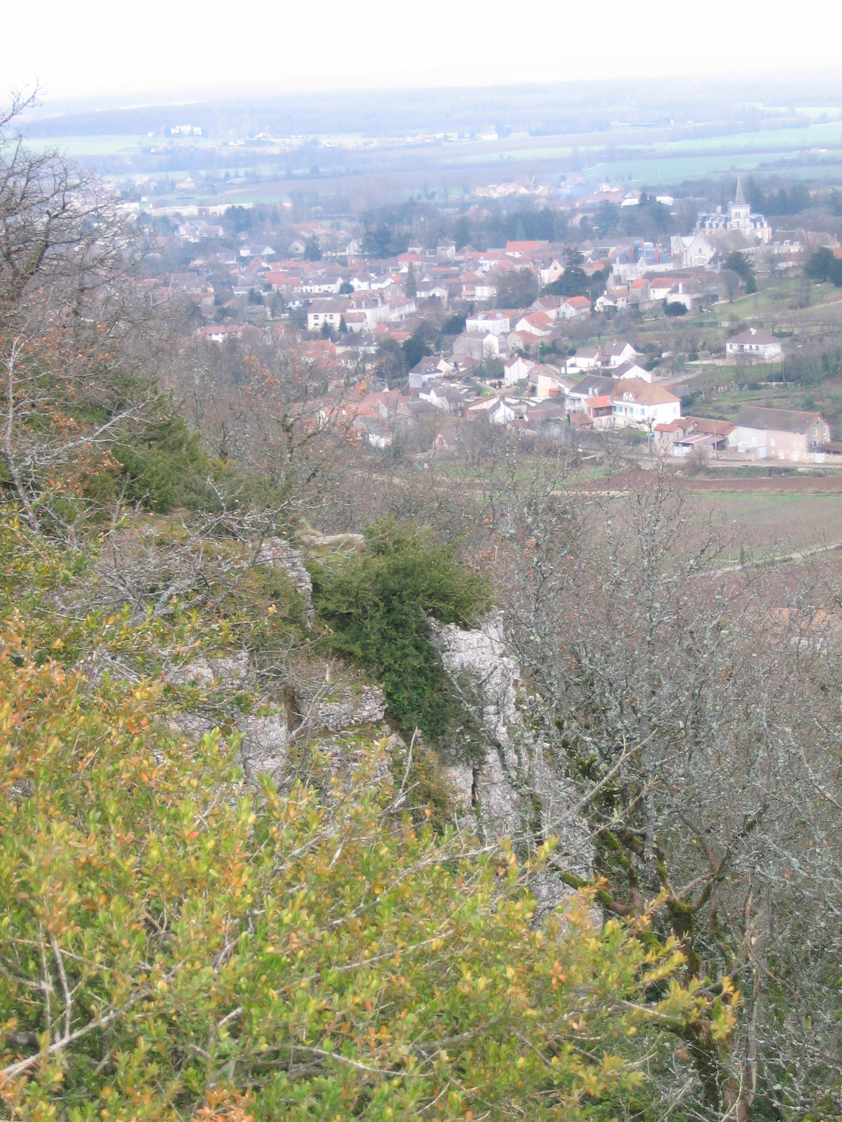 Village de Bouzeron (Saône et Loire) en arrière-plan.